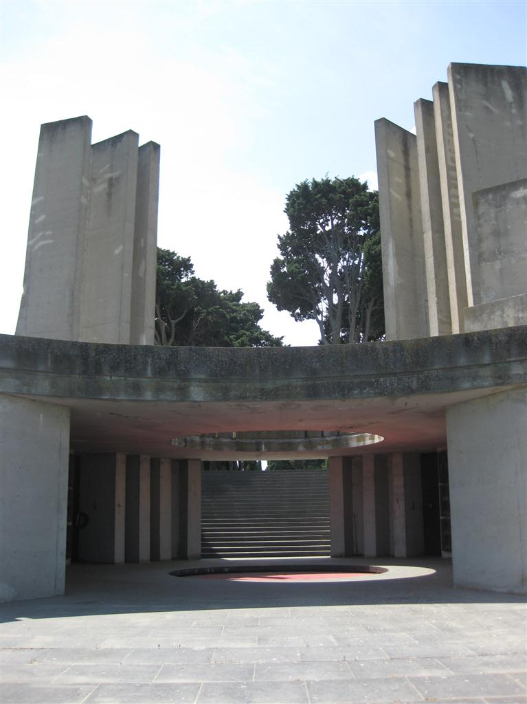 Ossario Commemorativo dei Caduti Slavi, costruito nel cimitero di Barletta alla fine degli anni sessanta su iniziativa del Sindaco Michele Morelli ed inaugurato il 4 luglio 1970. Progettato dallo scultore Dušan Džamonja, Custodisce i resti di 825 morti e di altri 463 combattenti dei quali non erano state reperite le spoglie, per un totale di 1288 caduti slavi. Di grande impatto è l'apertura circolare nel pavimento della sala principale, rivestito da un mosaico di colore rosso vivo per simboleggiare il sangue versato dai combattenti jugoslavi in occasione della resistenza antifascista e antinazista italiana.